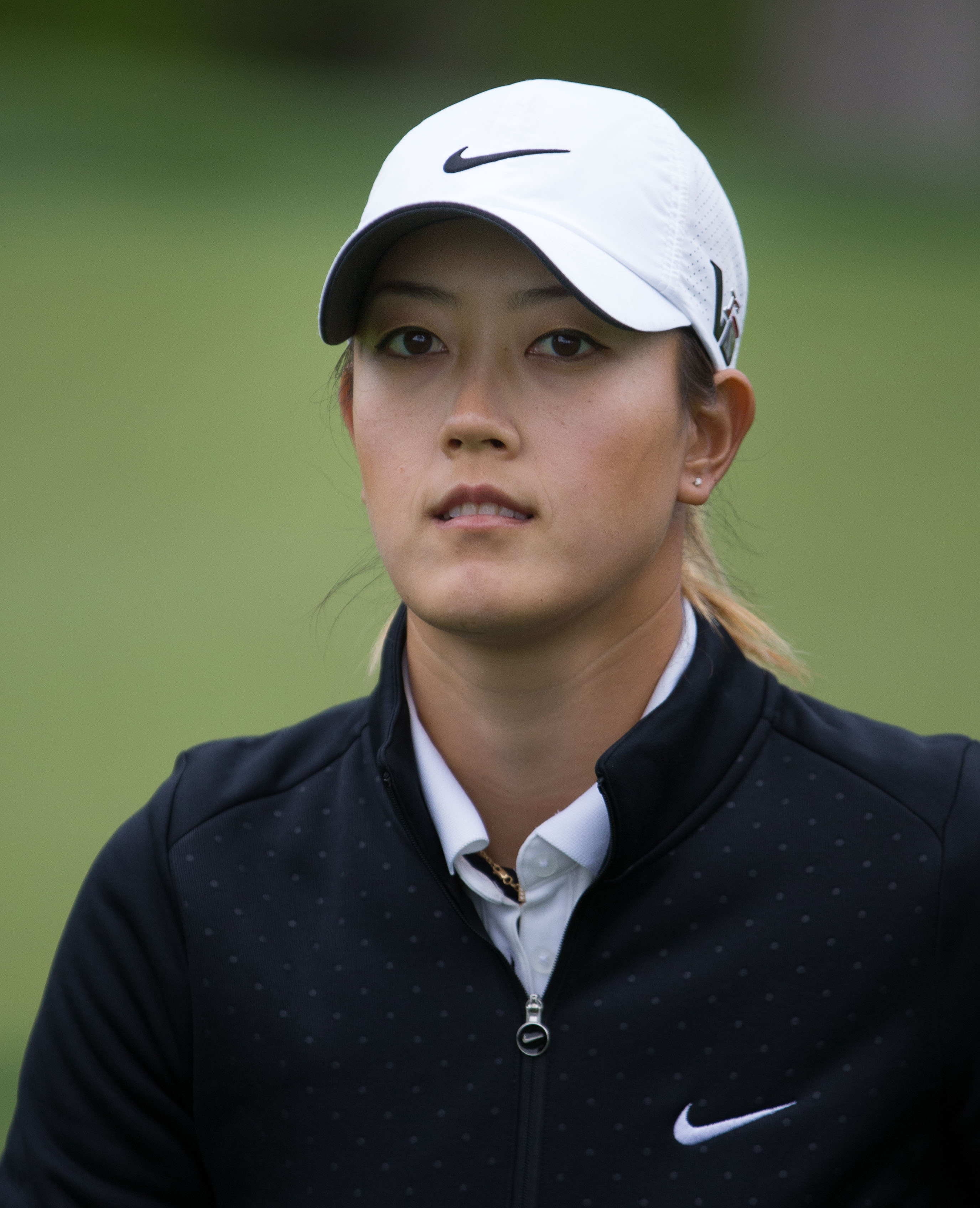 LPGA Kingsmill May 1, 2013